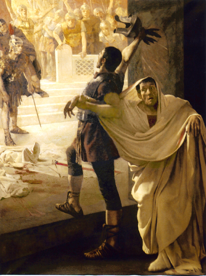 Jean-Paul Sinibaldi, Claude proclamé empereur, 1886, Sète, musée Paul Valéry